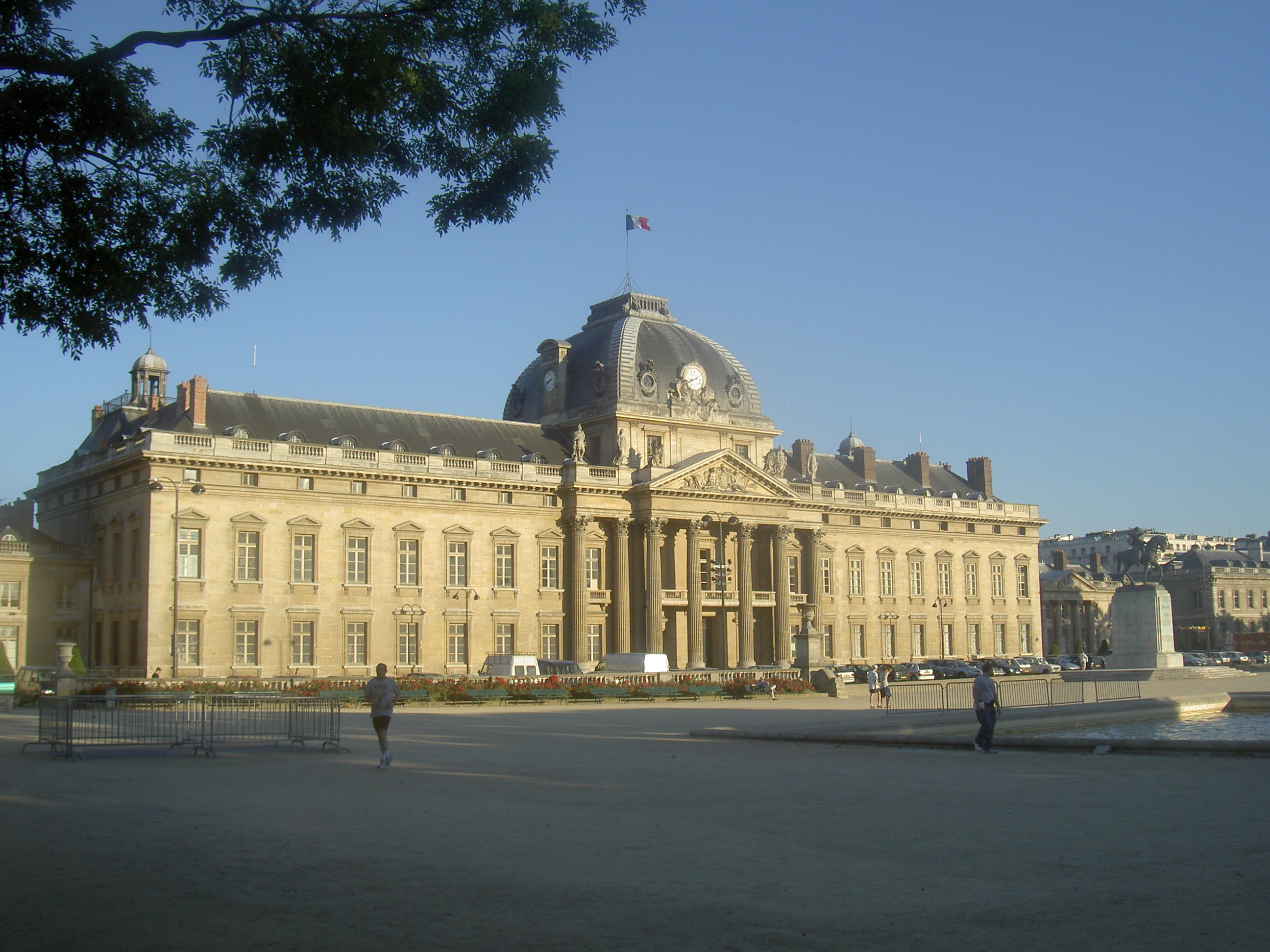 École Militaire, Paris